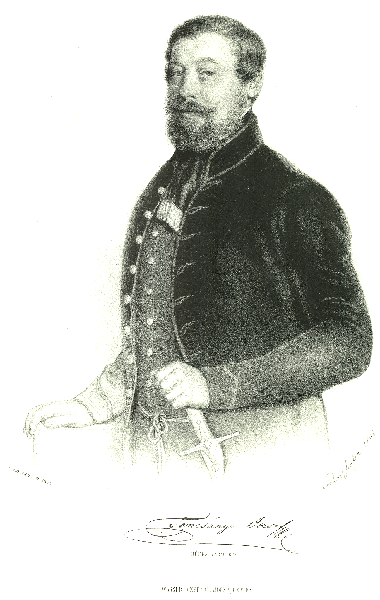 Tomcsányi József (Békés, 1807. március 26. – Budapest, 1878. május 4.) országgyűlési követ, Arad, Csongrád és Békés vármegyék főispánja, főrendiházi tag.